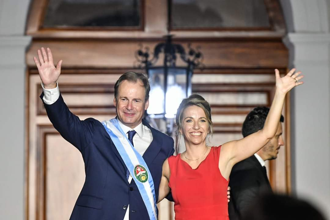 María Laura Stratta - Vicegobernadora de Entre Ríos junto al gobernador Gustavo Bordet en el acto de asunción de diciembre de 2019